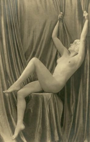 Folies Bergere Performer - Colette Andris